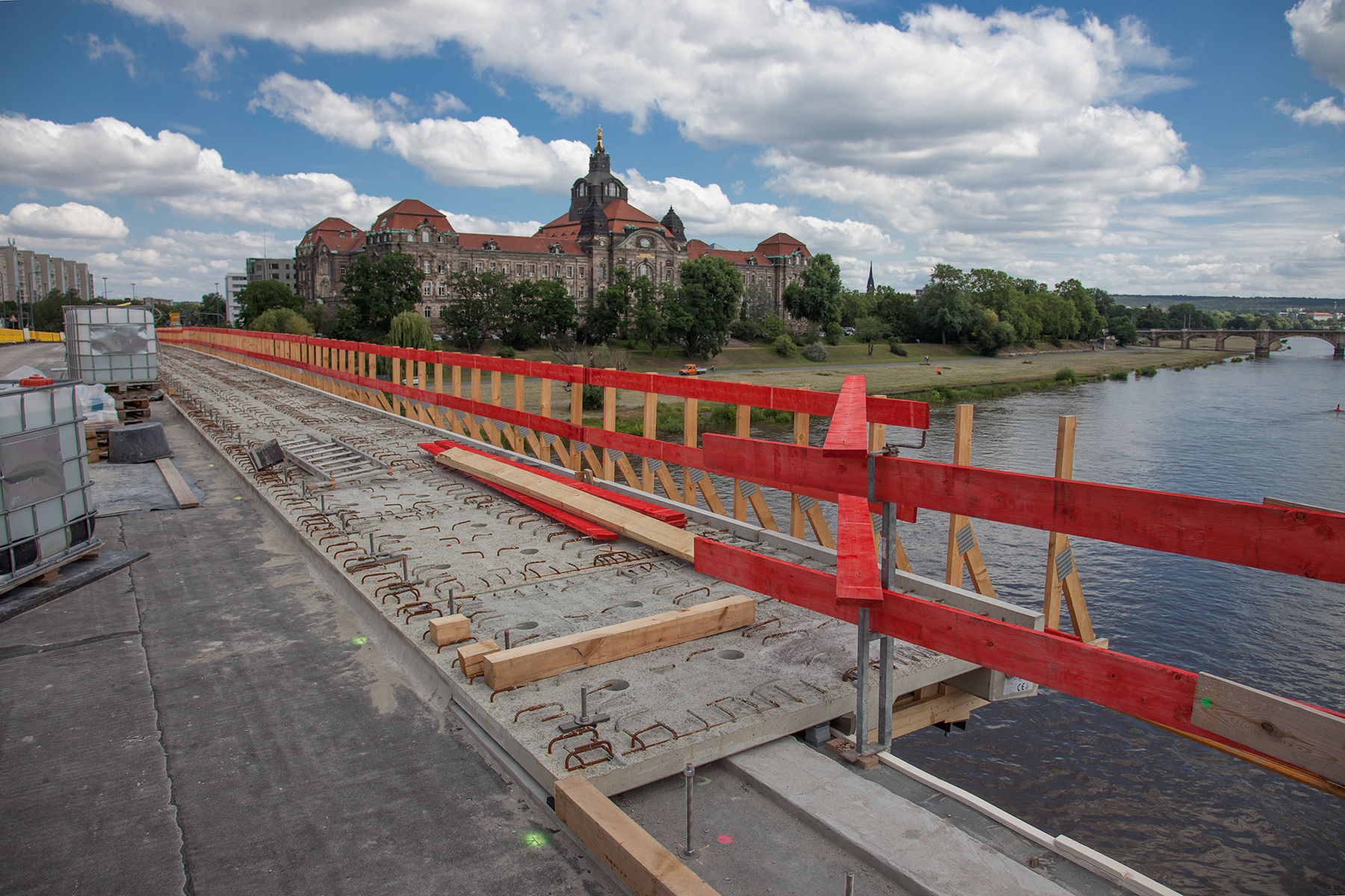 Bei der Sanierung der Carolabrücke in Dresden werden zur Verbreiterung der Fußgänger- bzw. Radwege Fertigteile aus Carbonbeton verbaut.